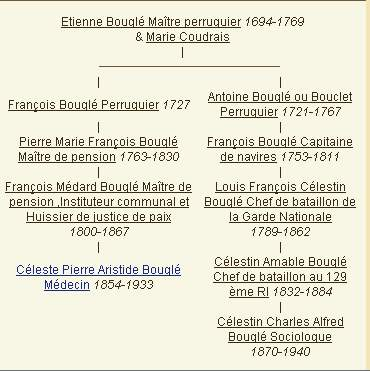 Parenté Céleste Bouglé Médecin / Célestin Bouglé sociologue